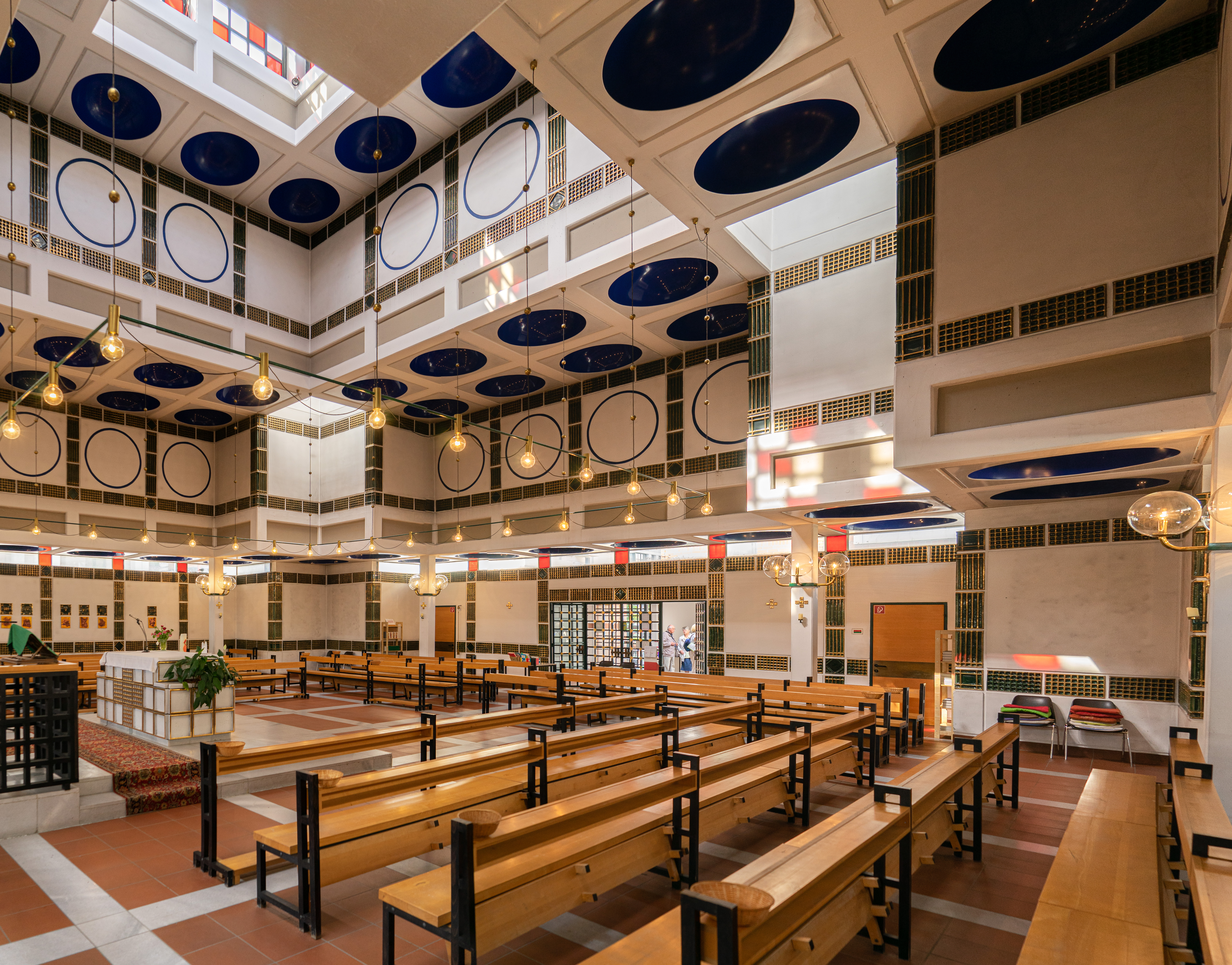 Kath. Pfarrkirche und Seelsorgezentrum Am Schöpfwerk hl. Franz von Assisi. Innenansicht